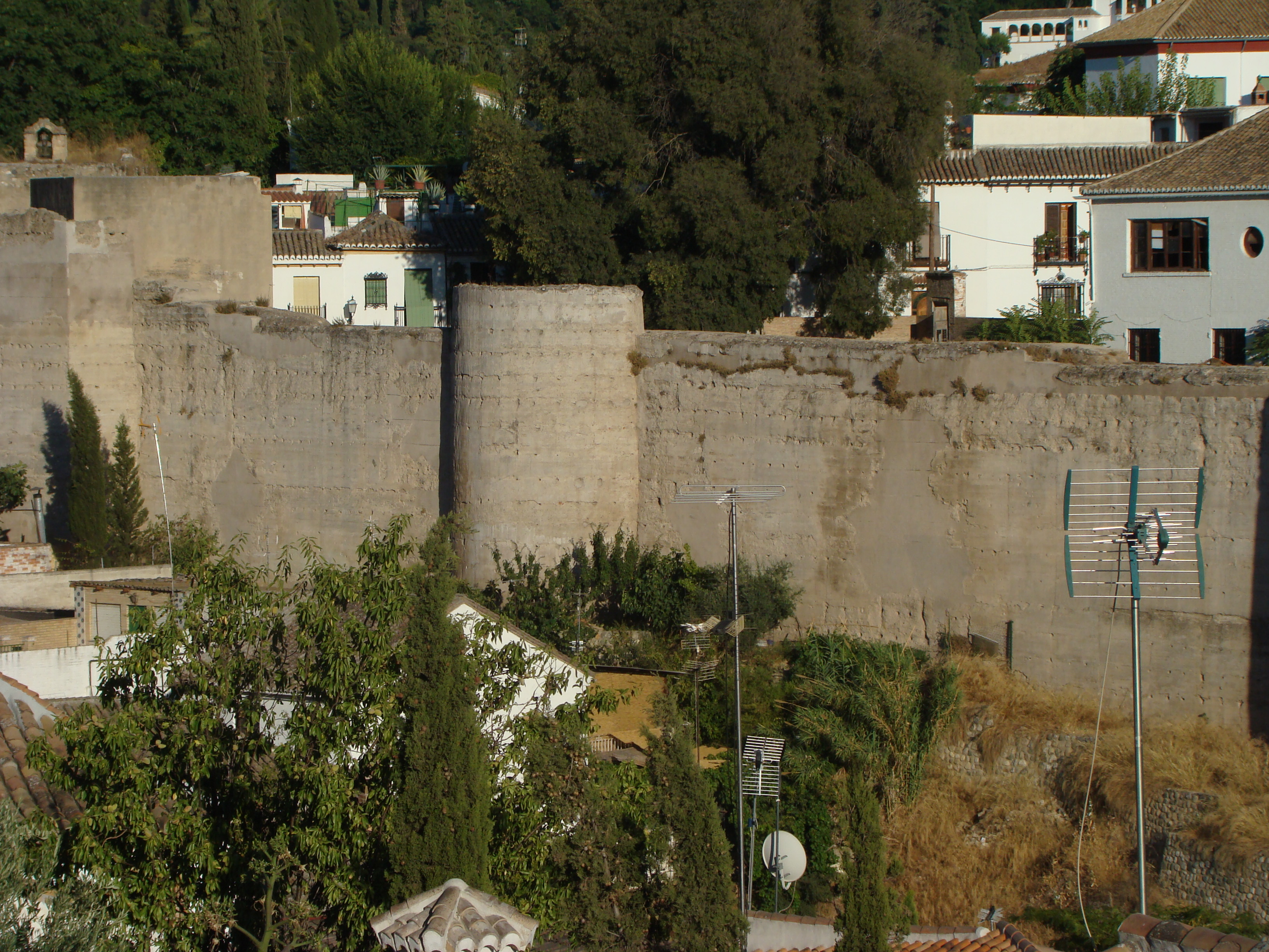 Vista de las murallas ziríes de la Alcazaba Cadima, en Granada